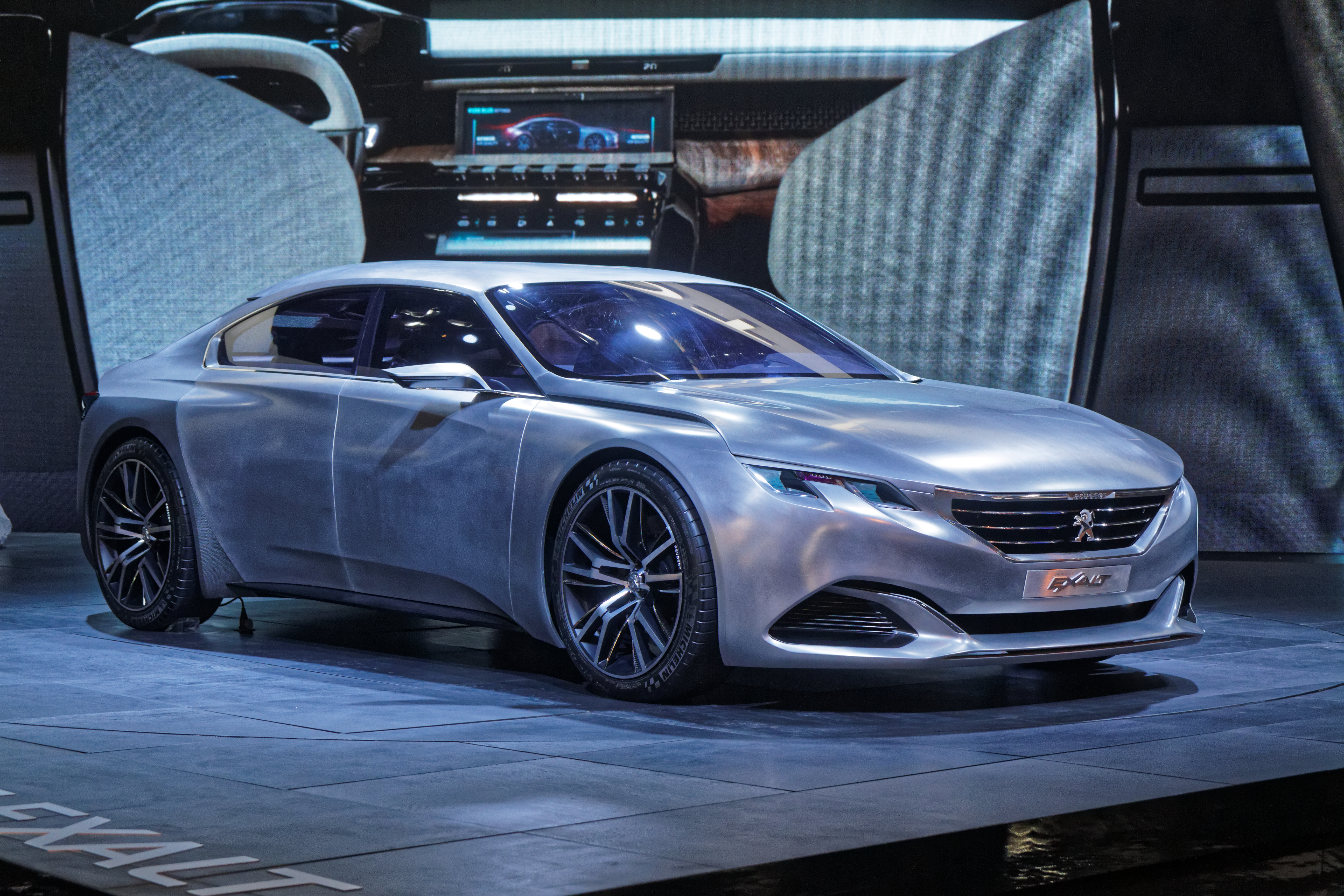 Une Peugeot Exalt présentée lors du mondial de l'automobile de Paris 2014.